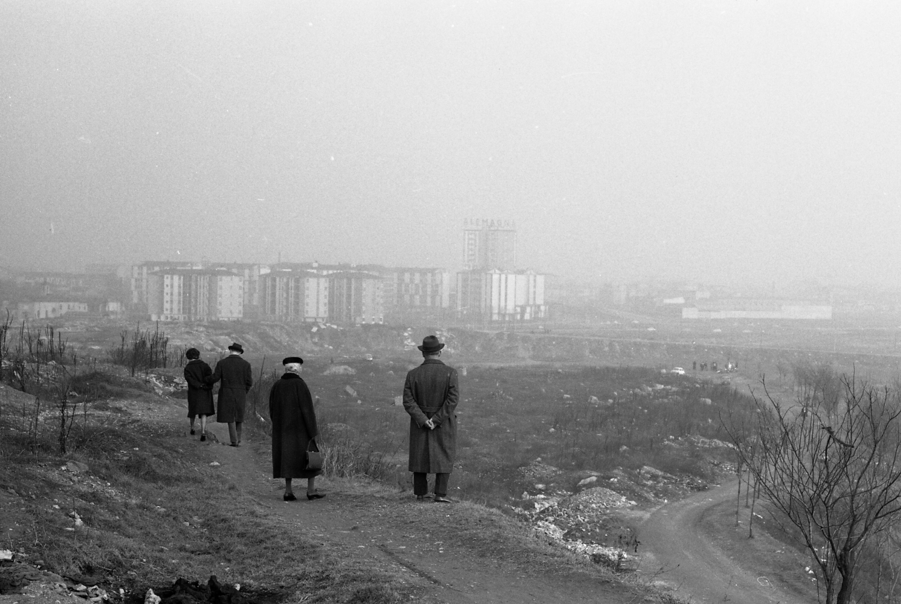 Serie fotografica : Milano, 1962 / Paolo Monti. - Strisce: 1, Fotogrammi complessivi: 4 : Negativo b/n, gelatina bromuro d'argento/ pellicola ; 35 mm. - ((I fotogrammi hanno una doppia numerazione. . - Sul portanegativi: Pentax FP3. - Serie Verde. - Il Monte Stella, meglio conosciuto come la Montagnetta di San Siro, è una collina artificiale piantumata, formata con l'accumulo di macerie provocate dalle bombe della seconda guerra mondiale e con materiale proveninete dalle demolizioni dei bastioni spianati dopo il 1945. Venne edificato intorno al 1946 a ridosso del quartiere QT8, dall'architetto Piero Bottoni, che lo dedicò alla moglie Stella, da cui il nome Parco Monte Stella. - Fonte: Agenda di Paolo Monti: Foto Leica 1 / 1-51 verde, 1-110 nera (1958-1963), presso Archivio Paolo Monti